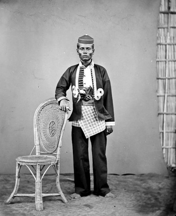 Repronegatief. Lokaal hoofd van de eilanden ten zuiden van Celebes